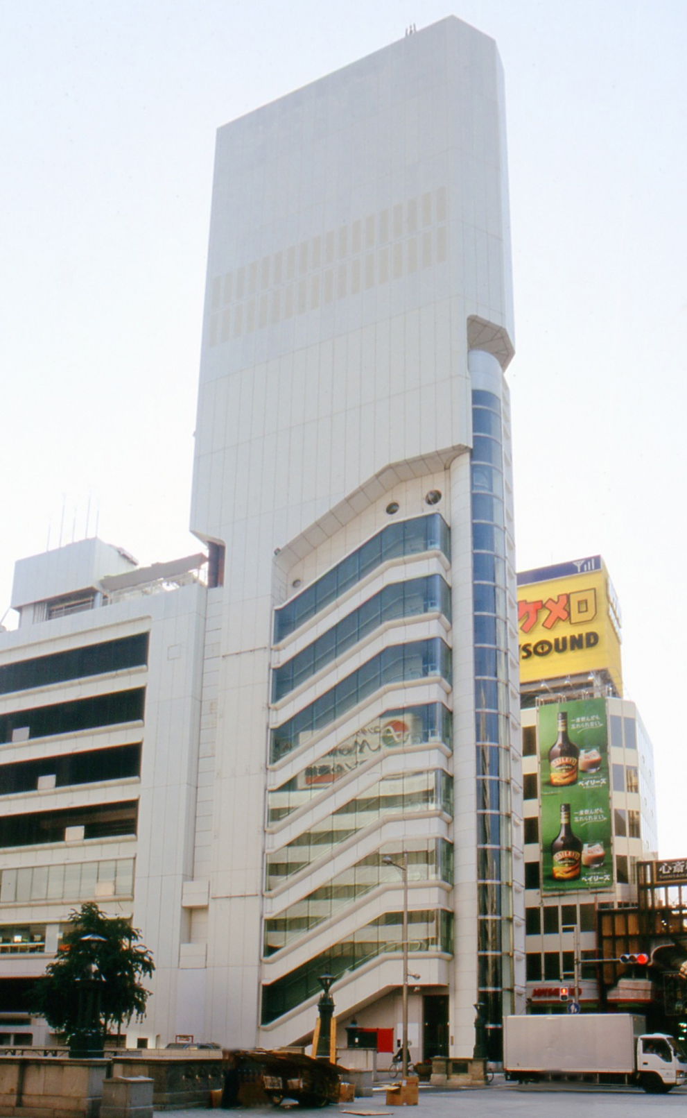 Kurokawa: Sony building, 1976, Osaka